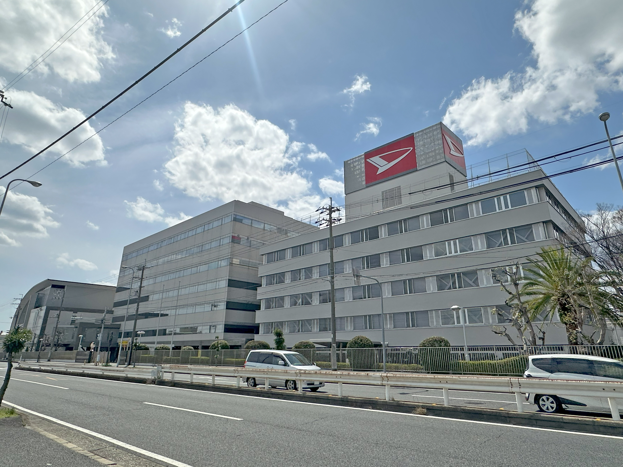 ダイハツ工業株式会社本社を撮影